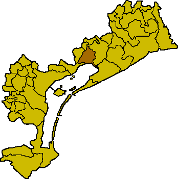 Lage an der Lagune von Venedig.